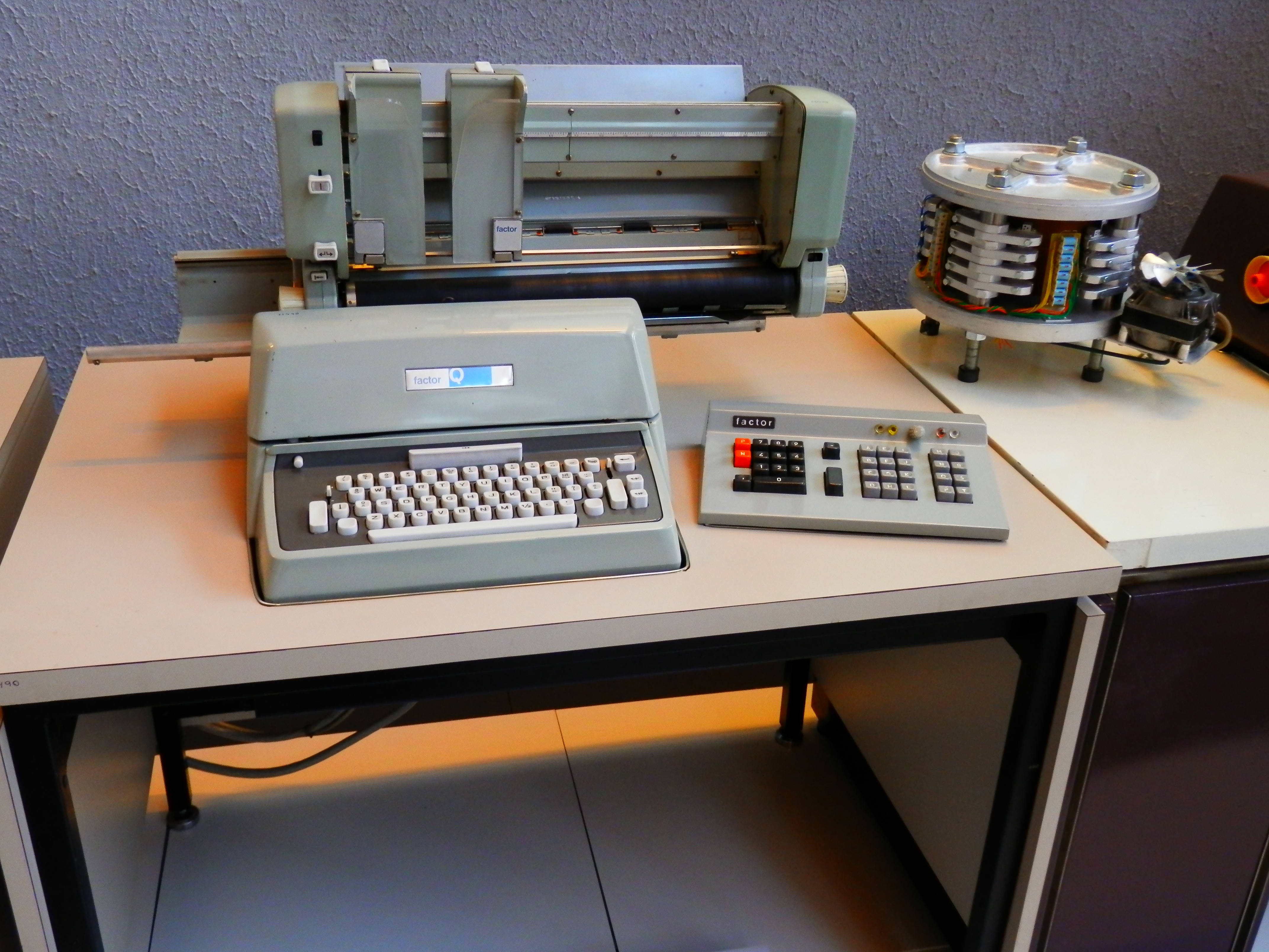 Fotografia d'un miniordinador fabricat per l'empresa catalana Telesincro l'any 1971. Es tracta d'un Factor S, amb número de registre 11482 i 11488. Està compost per tres blocs principals: unitat de procés amb memòria central (de 2.048 o 2kb), i perifèrics d'entrada i sortida (casset, impressora, introductor de targetes amb banda magnètica i teclat alfanumèric).